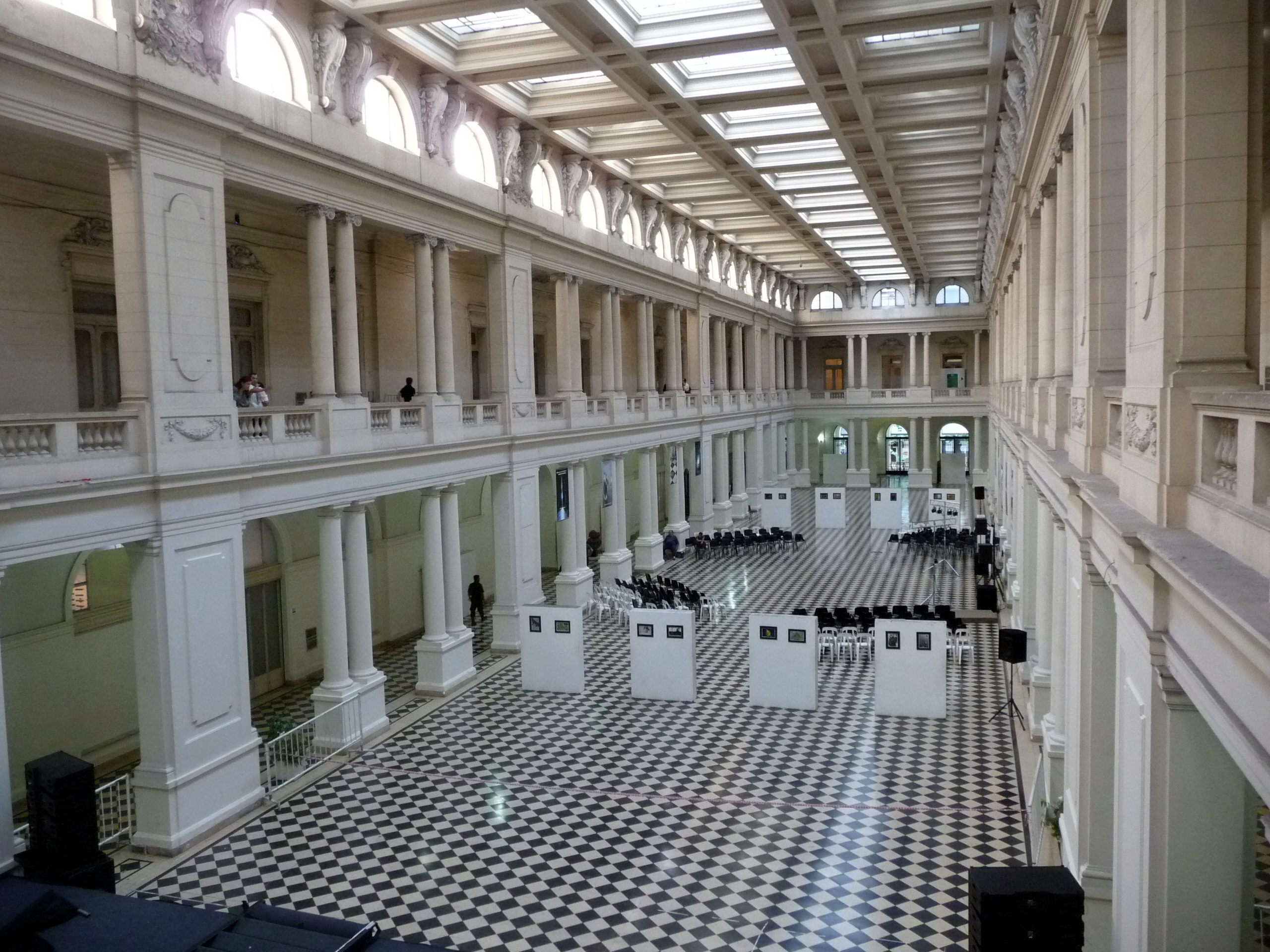 Interior del salón central del Passje Dardo Rocha